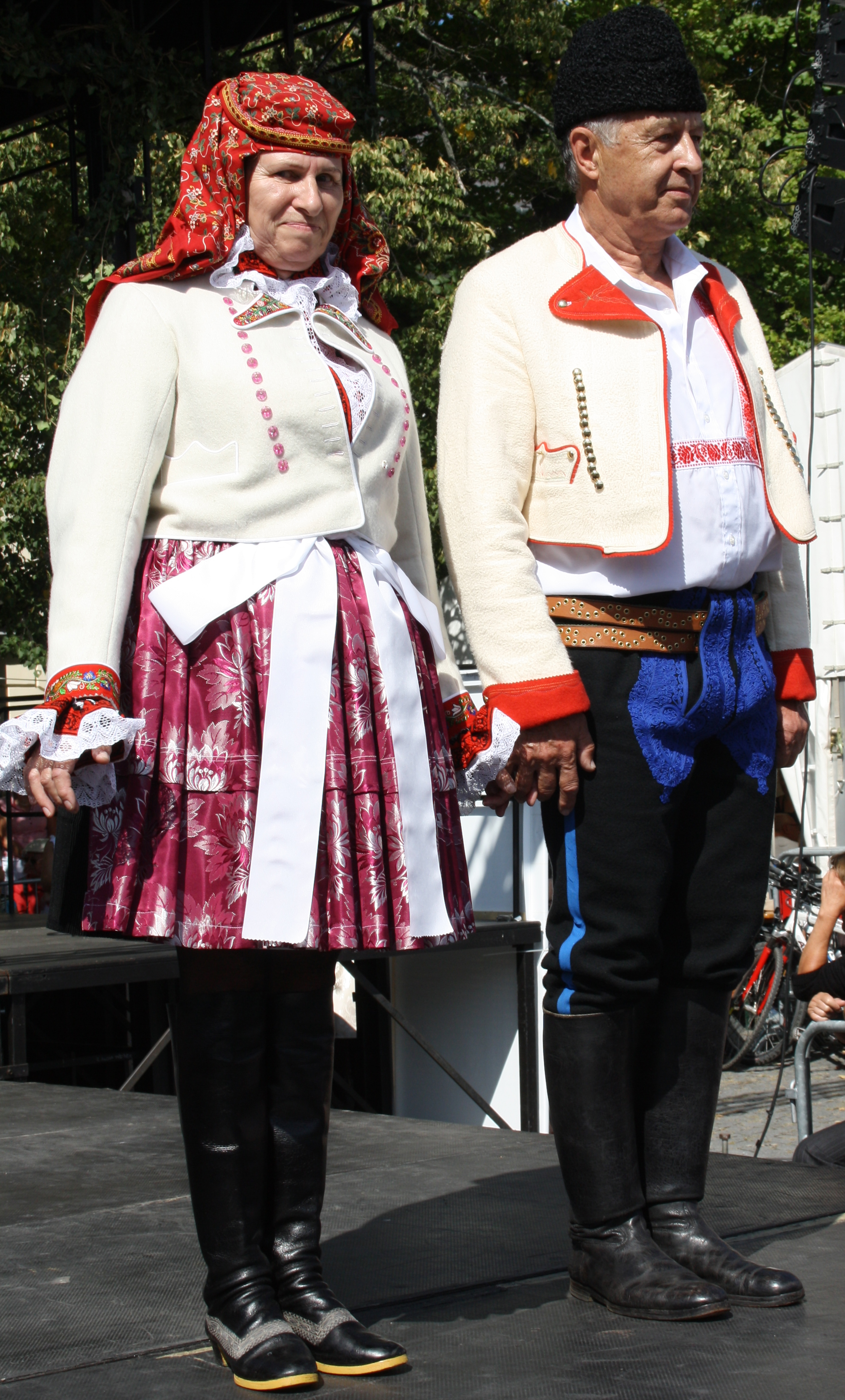 Pohled na přední část slavnostního kroje vdané ženy a ženatého muže z Kunovic (Slovácké slavnosti vína a otevřených památek v Uherském Hradišti 2011).